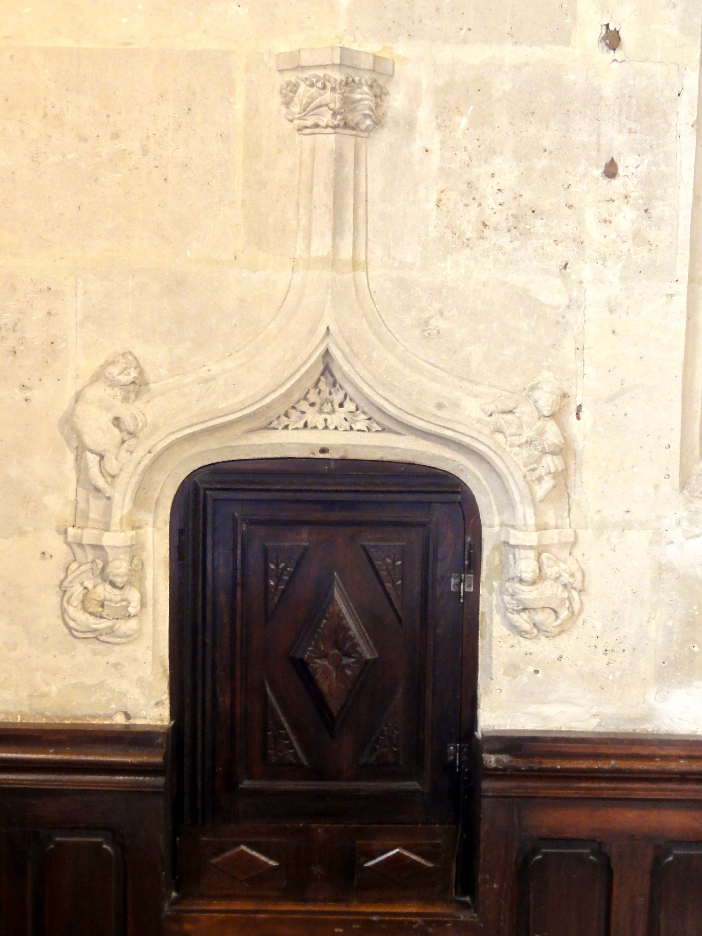 Chœur, collatéral sud, tabernacle (côté sud).